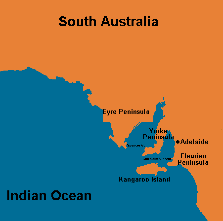 self made from picture